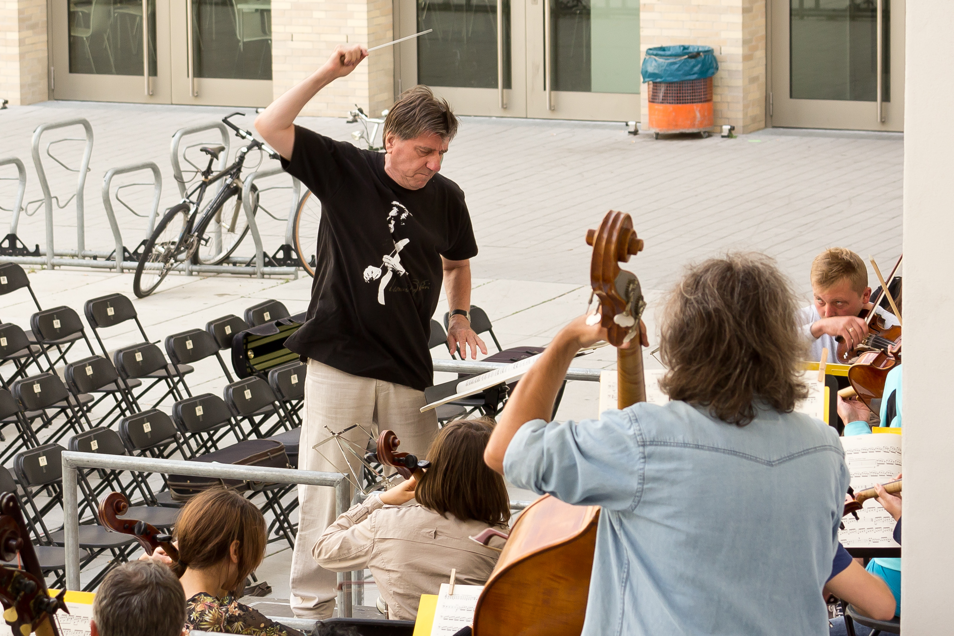 Wolfgang Seeliger während der Generalprobe (Carmina Burana im Rahmen der Darmstädter Residenzfestspiele 2013)